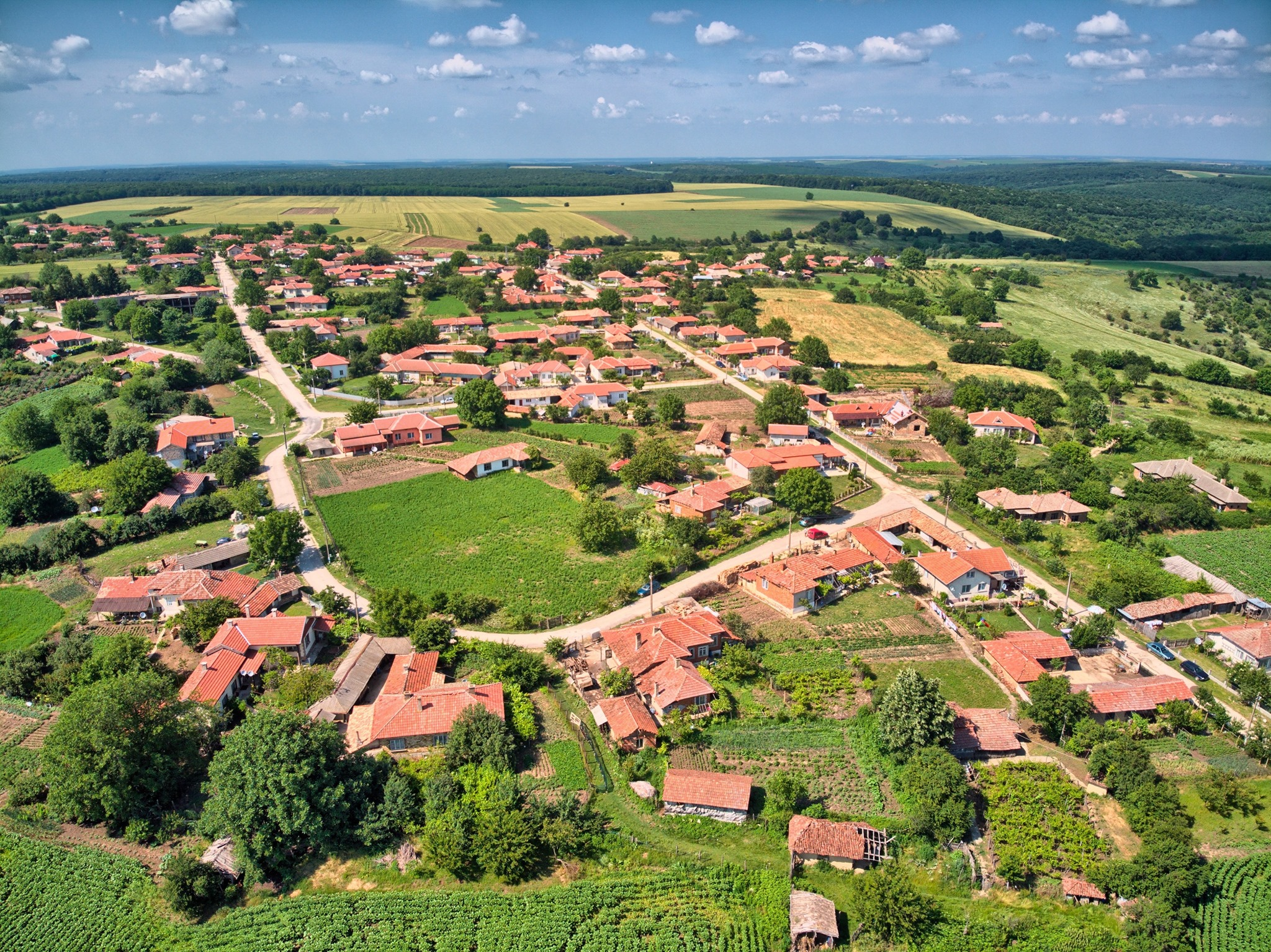 Зарица, Силистра